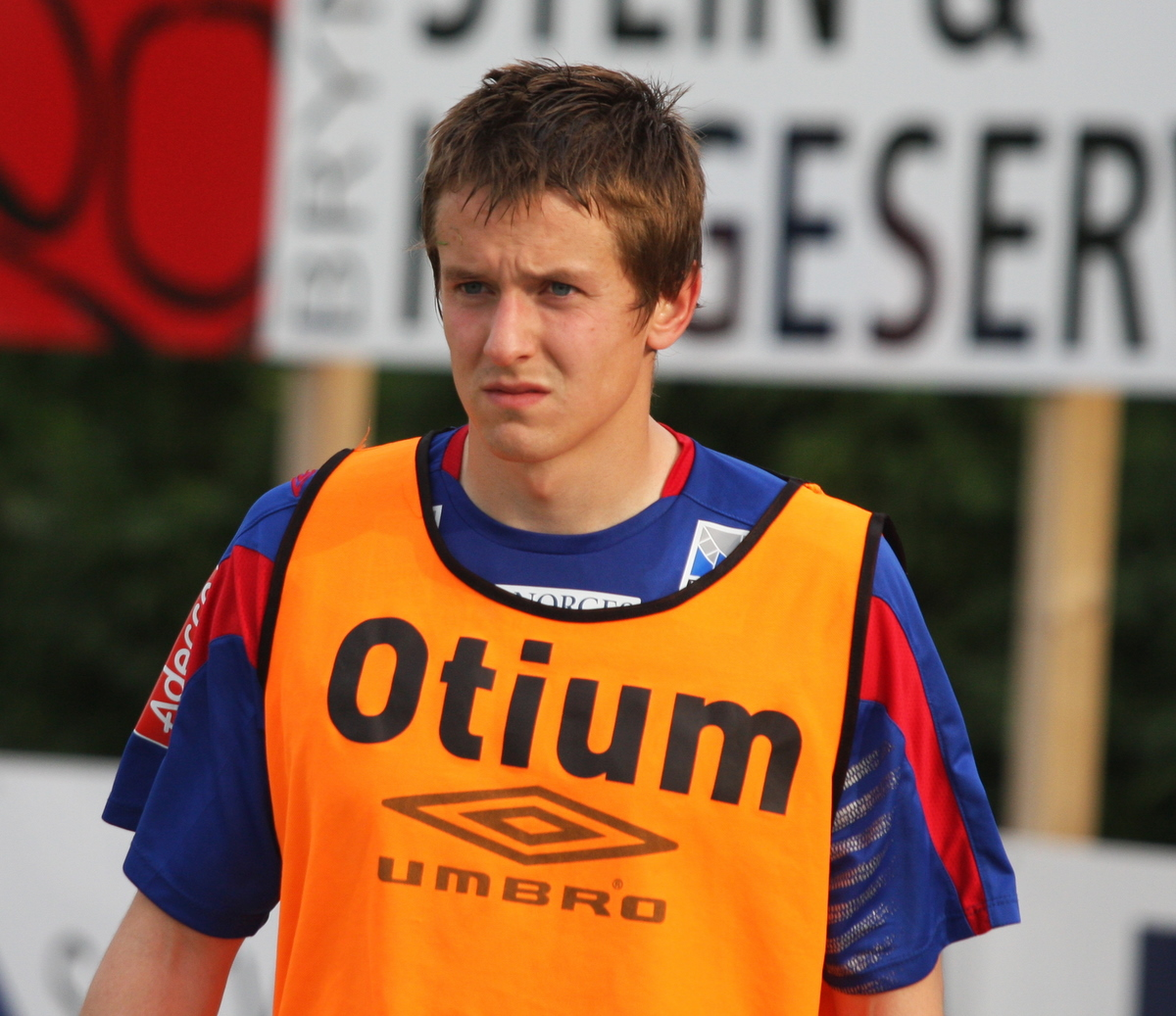 John Strøm